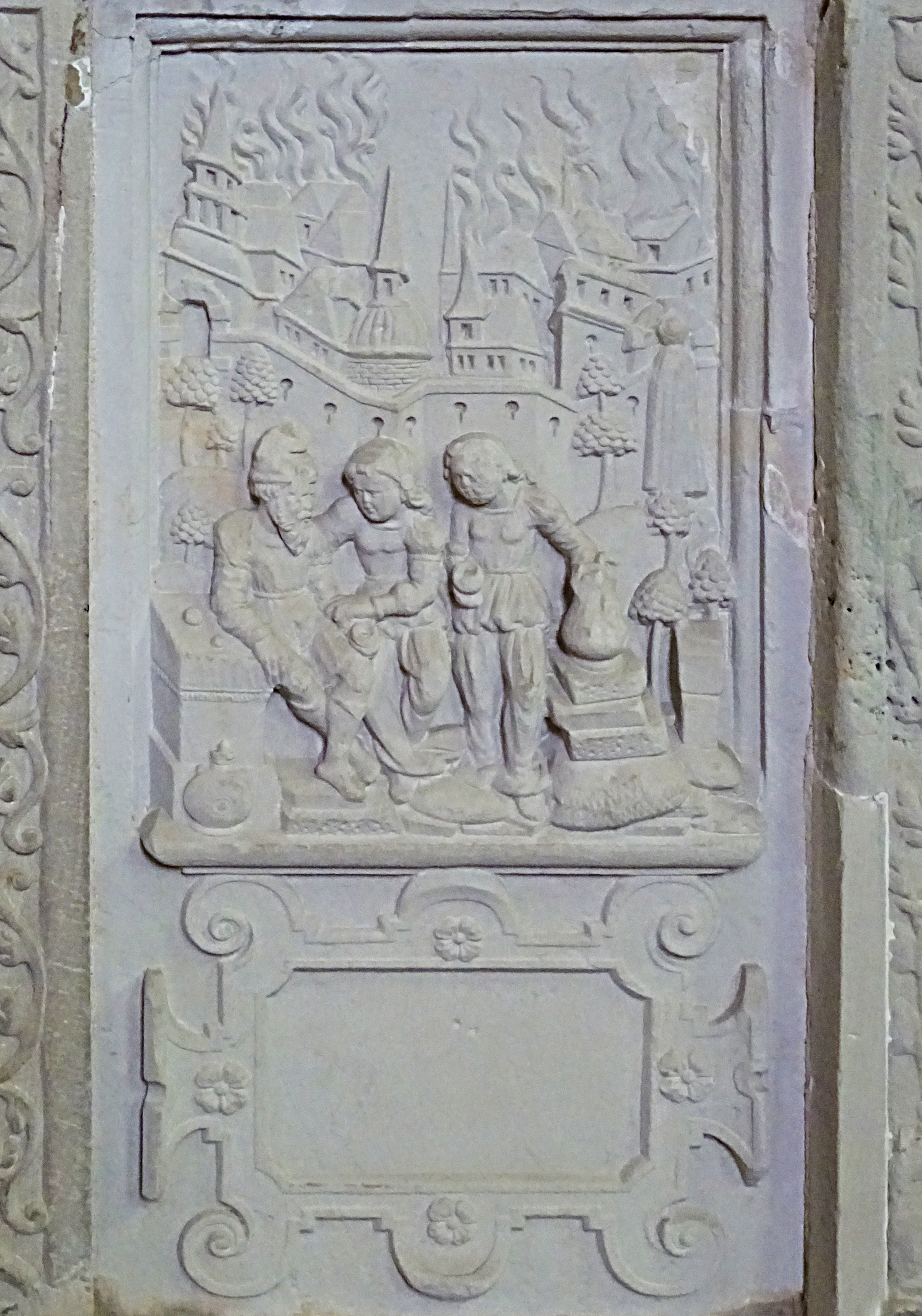 Steinbilderbibel in der St. Annenkirche (Eisleben), 11/29, Untergang von Sodom und Gomorra